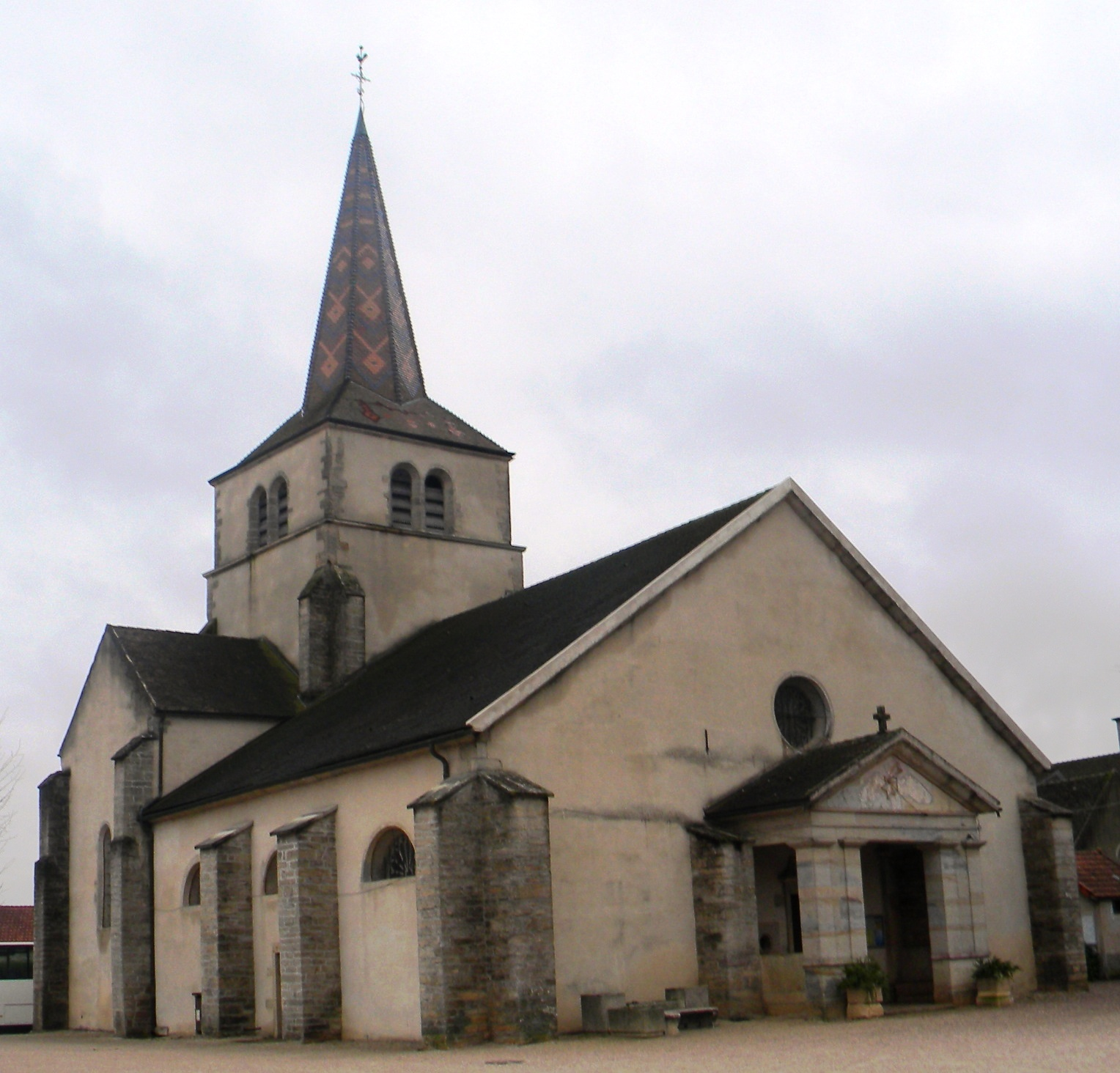 Eglise de Ladoix-Serrigny